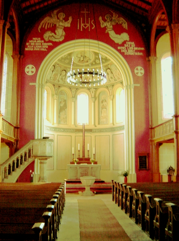 Sankt-Gertrauden-Kirche in Magdeburg-Buckau (innen nach Osten)